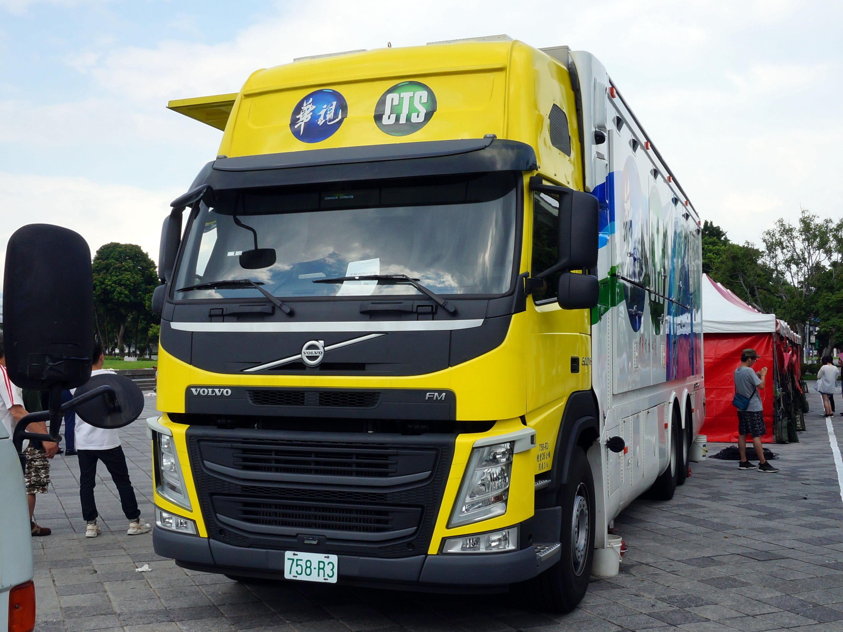 中華電視公司Volvo FM轉播車758-R3車頭。